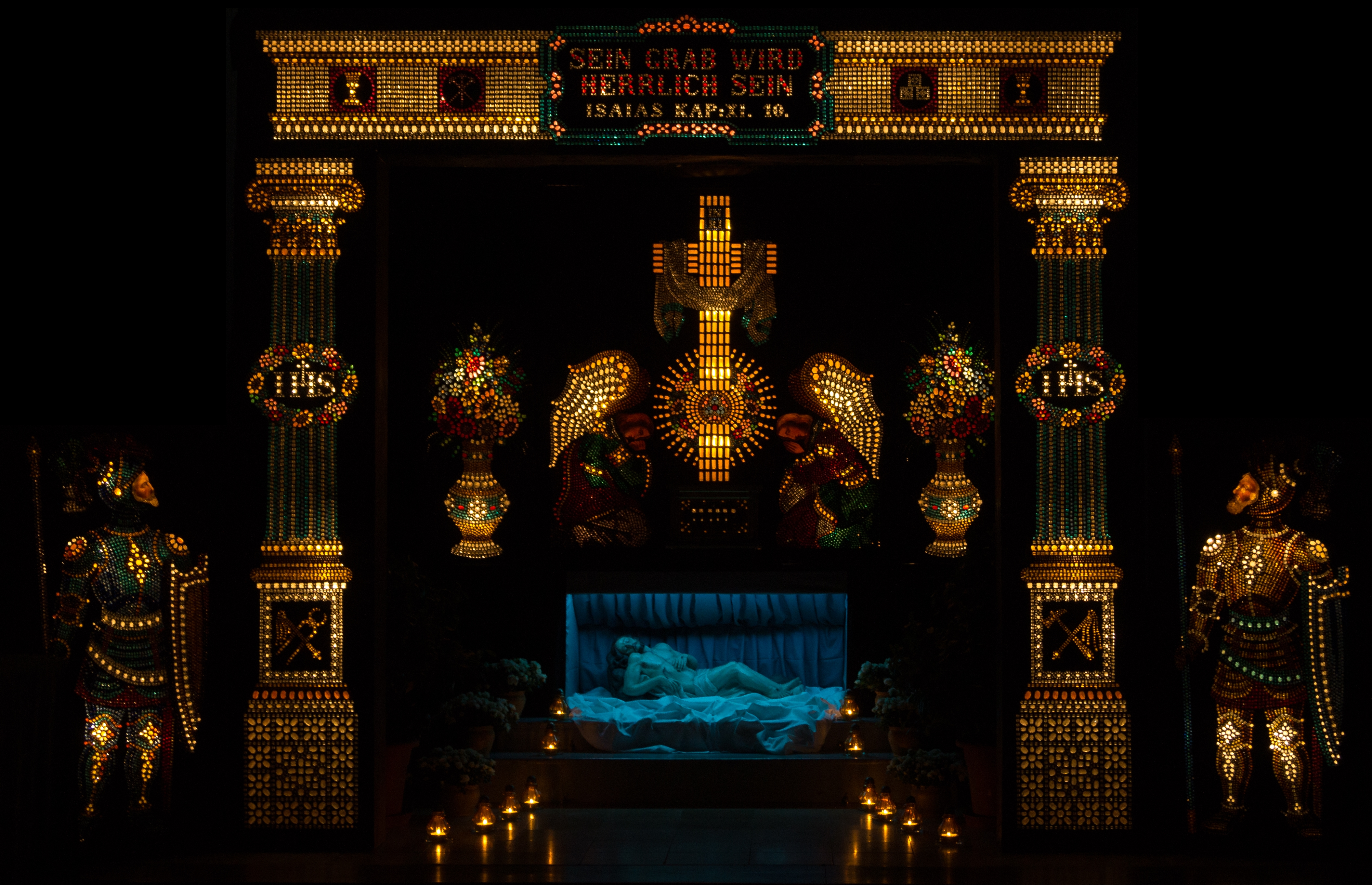 Heiliges Grab von Iffeldorf, Gesamtansicht.